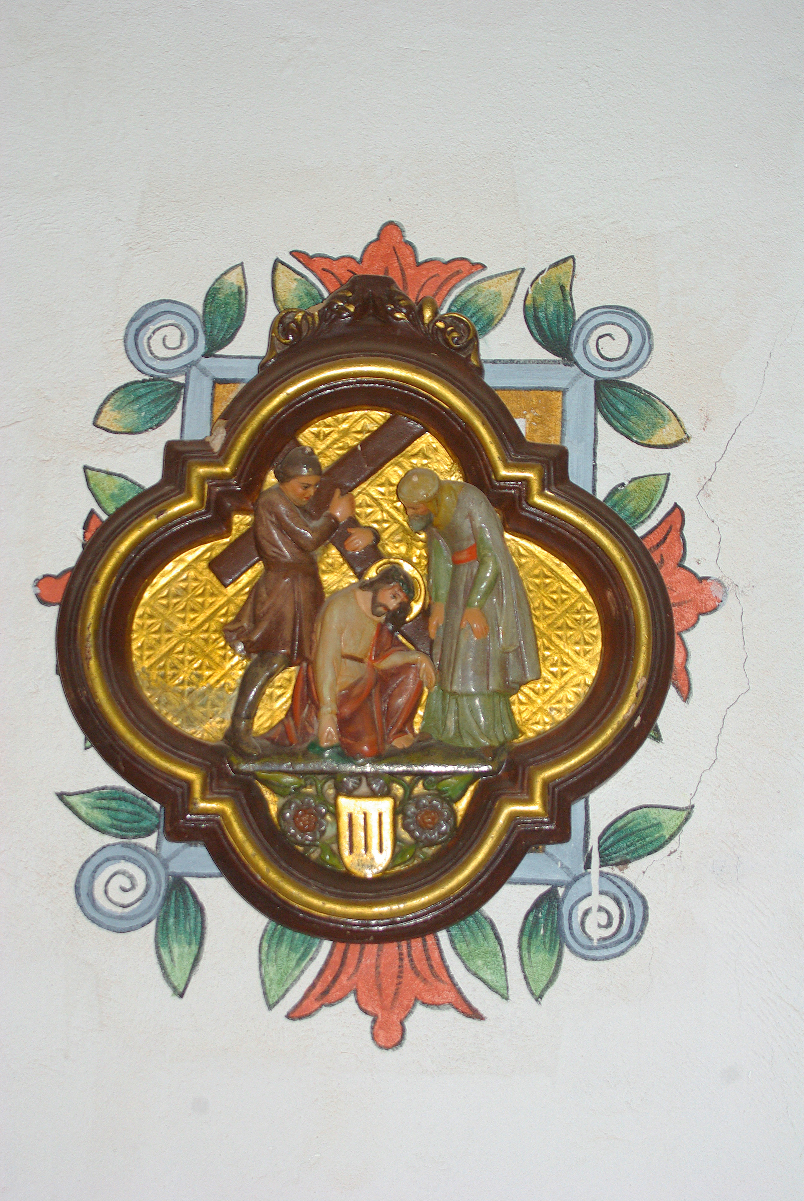 Detalle del interior de la iglesia antigua de Socaire, abril 2010